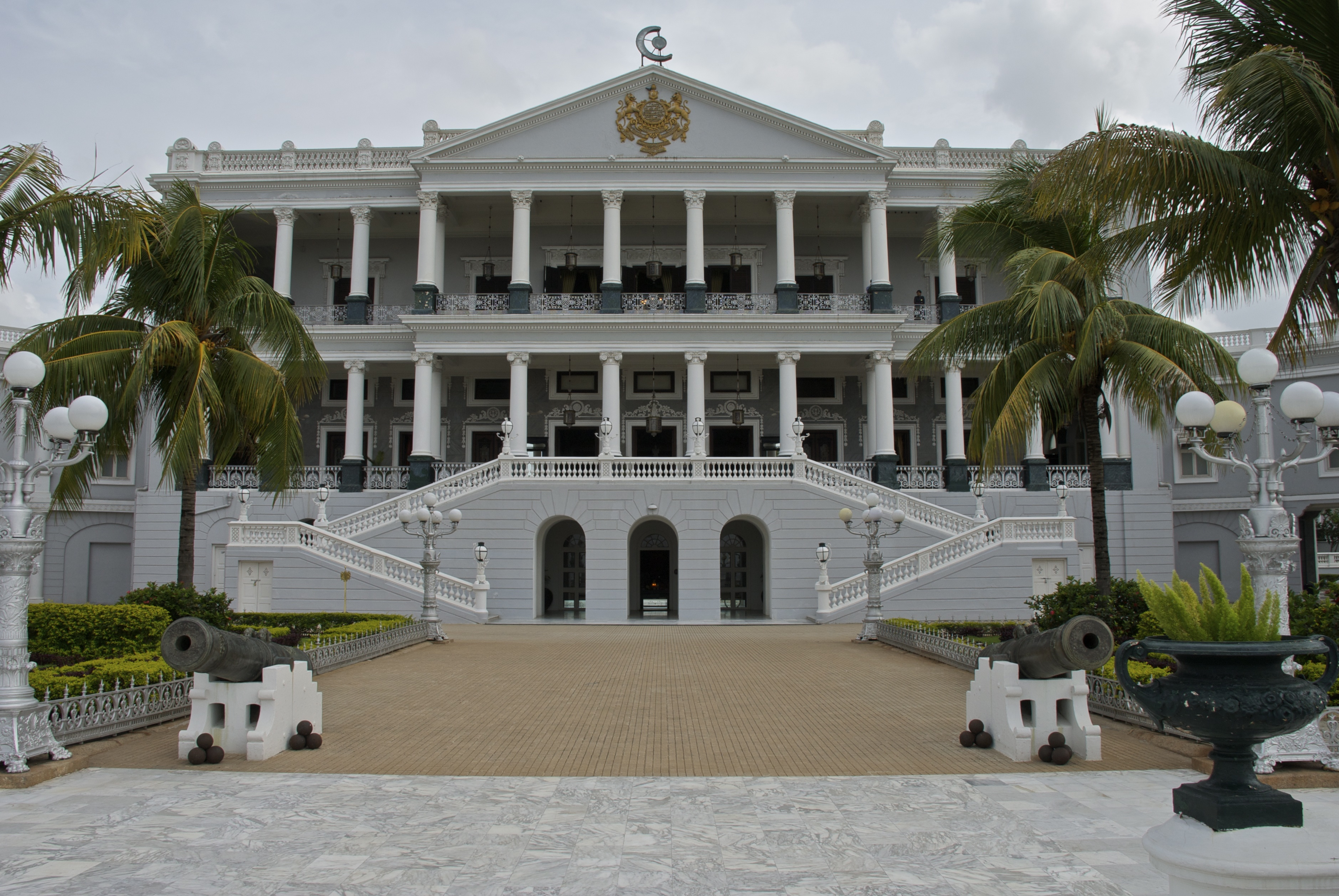 Taj Falaknuma Palace